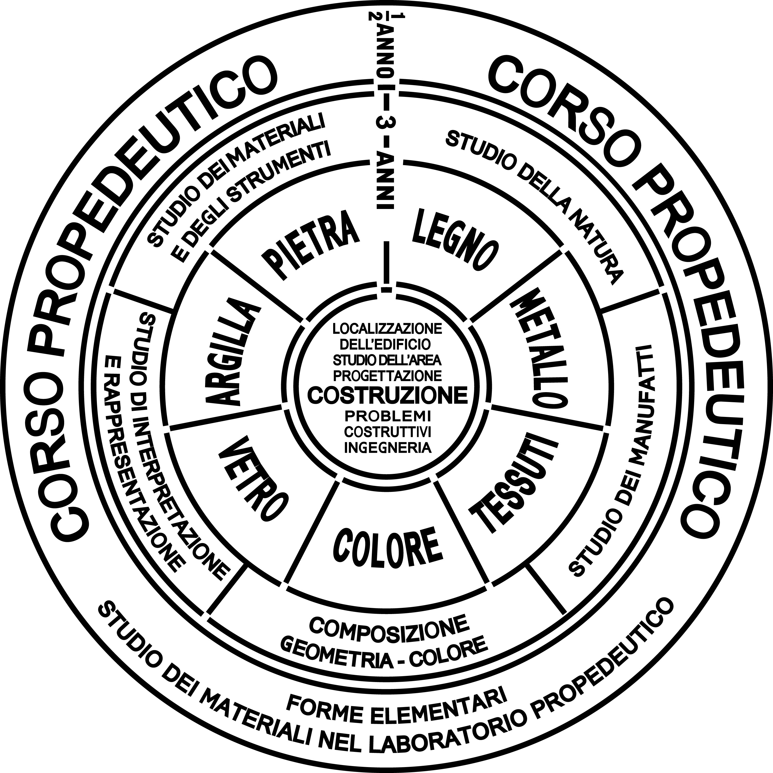 Il diagramma della struttura didattica del Bauhaus concepito da Walter Gropius nel 1922 e ridisegnato in italiano in occasione della Mostra Paul Klee e l'Italia.